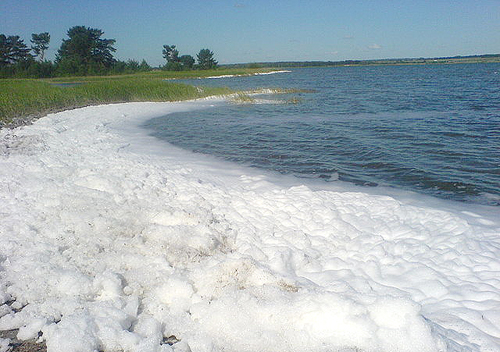 Озеро Горькое. Пена на берегу.